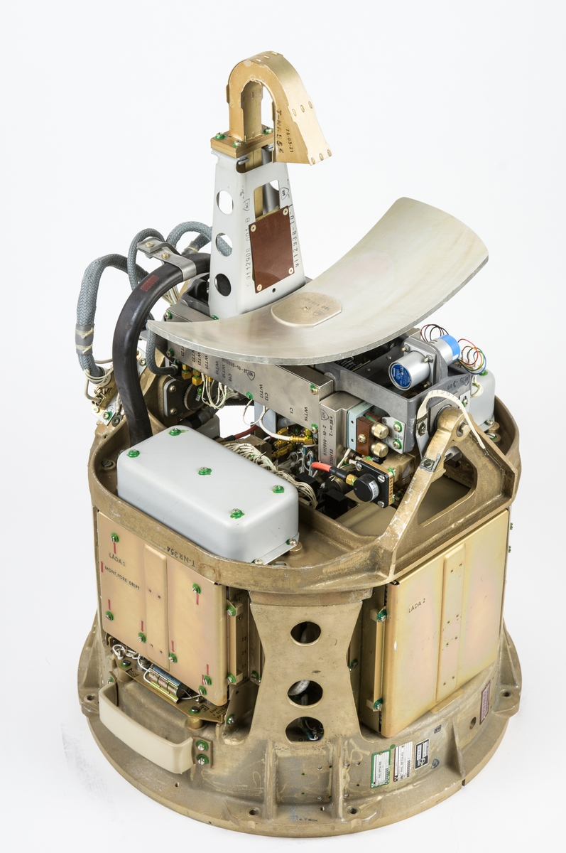 Apparat 642 till Robot 04